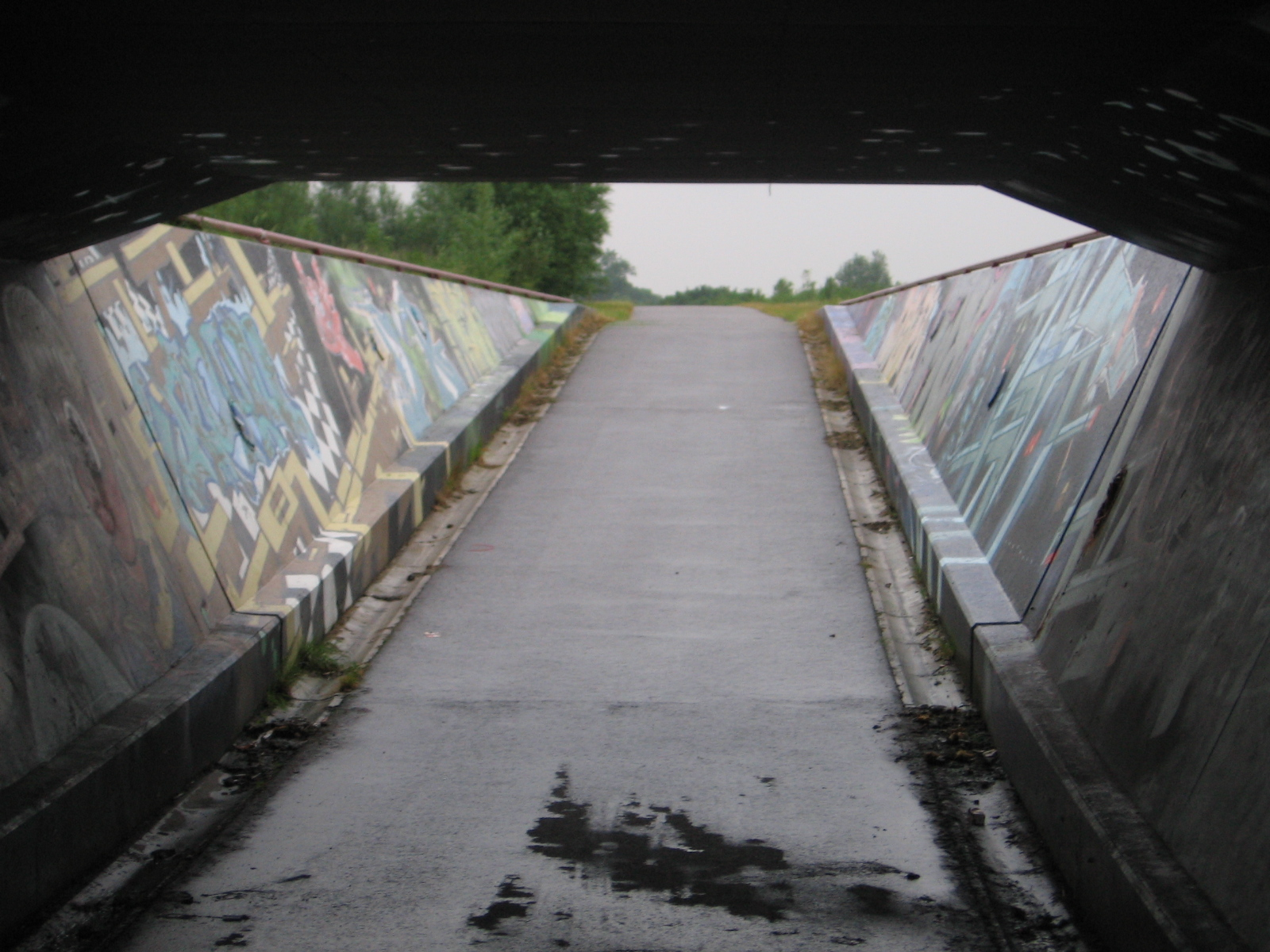 Fietstunnel onder spoorweg in Abtswoudse park, Delft